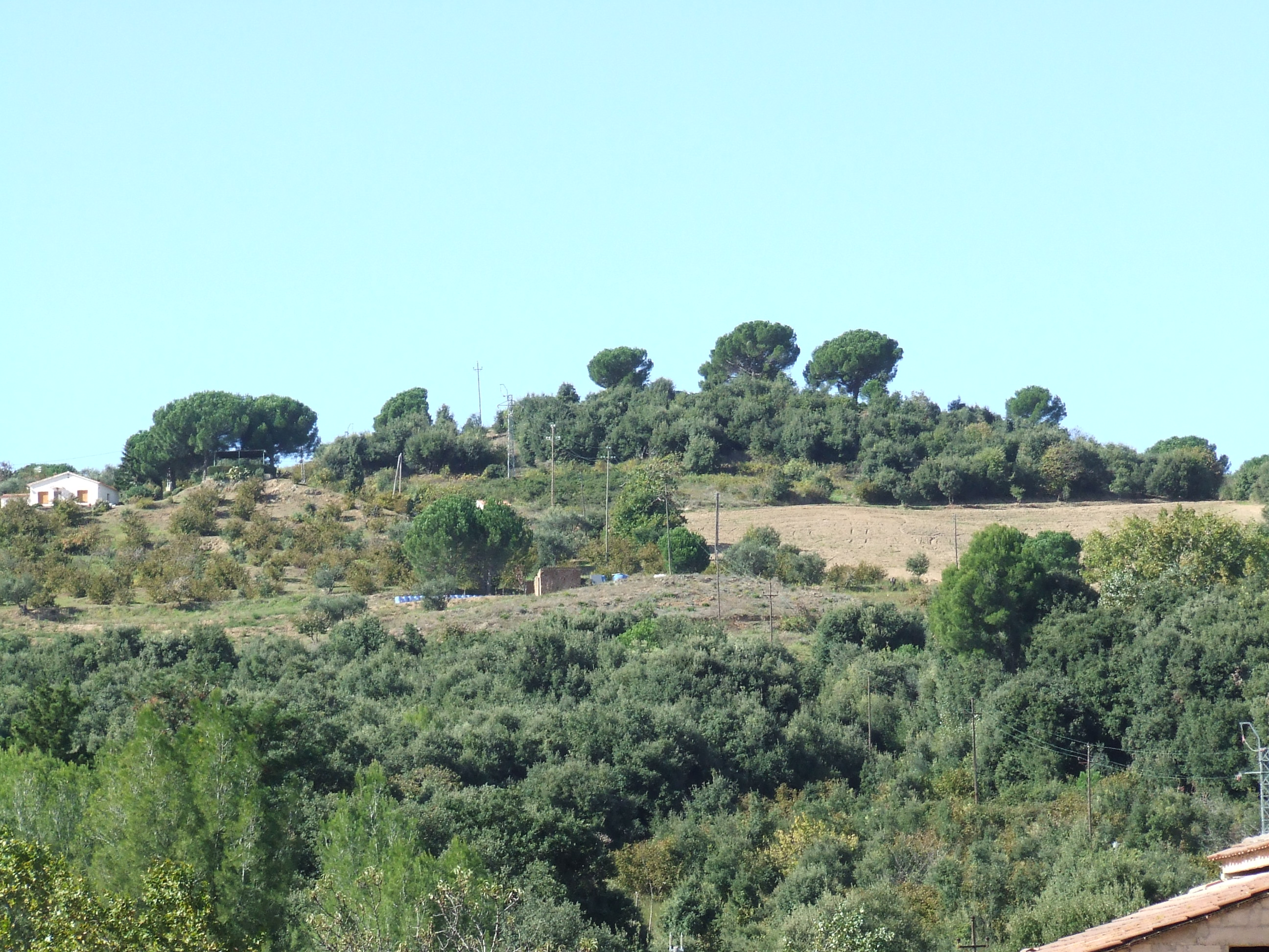 Turó del Camp Gran (Bigues i Riells, Vallès Oriental)